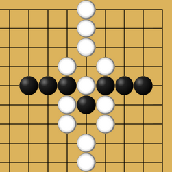 Un ko direct au jeu de go